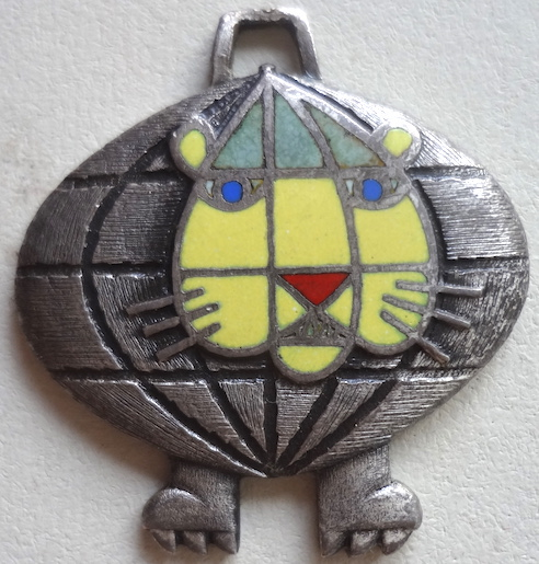 Médaille (pendentif) de la "Foire internationale de Lyon 1959", 4-13 avril.